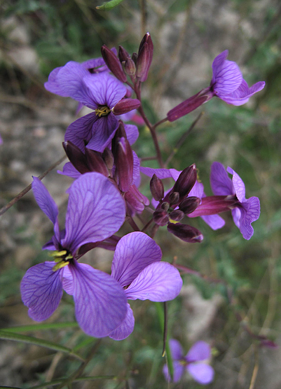 Flores de Moricandia arvensis, en Rambla de Alicante, Espeña.